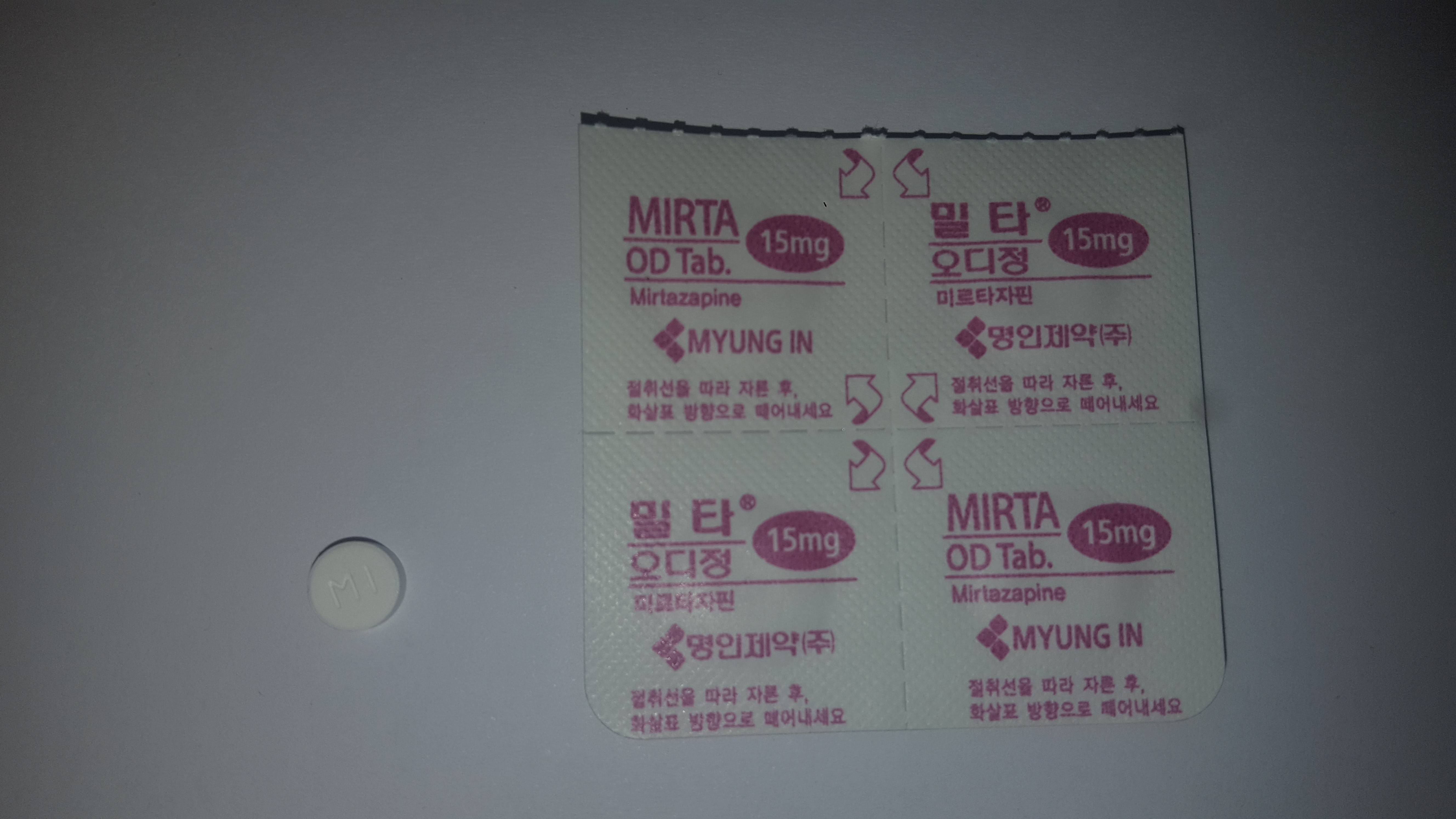 미르타자핀 '레메론 솔탭정' 제네릭 (명인제약)